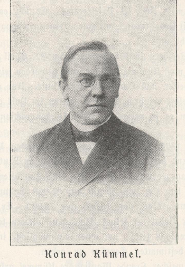 Konrad Kümmel, katholischer Priester, Volksschriftsteller